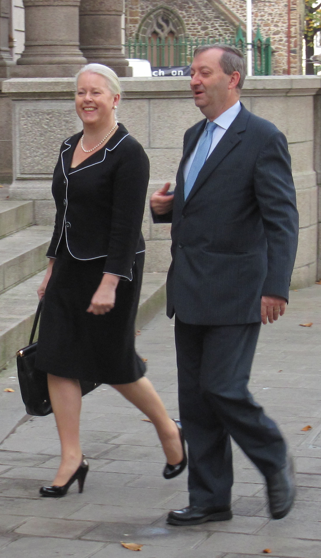 Nrf: Dans l'Vièr Marchi, Saint Hélyi, Jèrri: lé 14 dé Novembre, juste dévant l'assèrmentâtion des Membres d's Êtats dans la Cour Rouoyale.